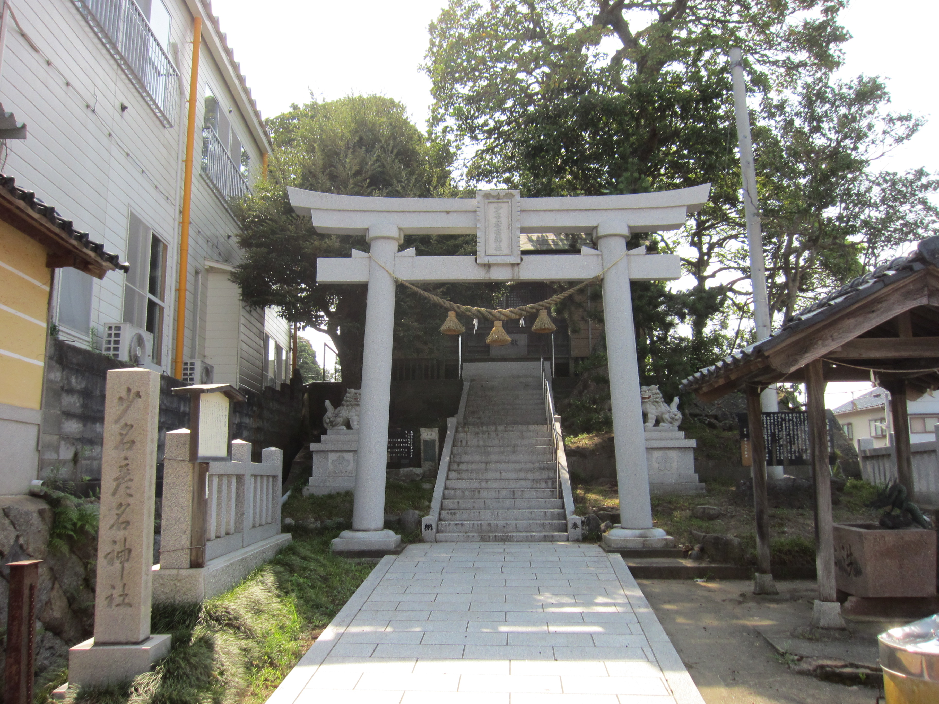 水犬塚 (羽咋七塚)